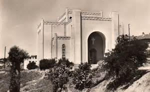 Façade de l'église du Sacré-Coeur de Maison-Carrée (aujourd'hui El-Harrach), construite en 1938. C'est aujourd'hui le bureau d'état-civil du quartier d'El-Harrach.